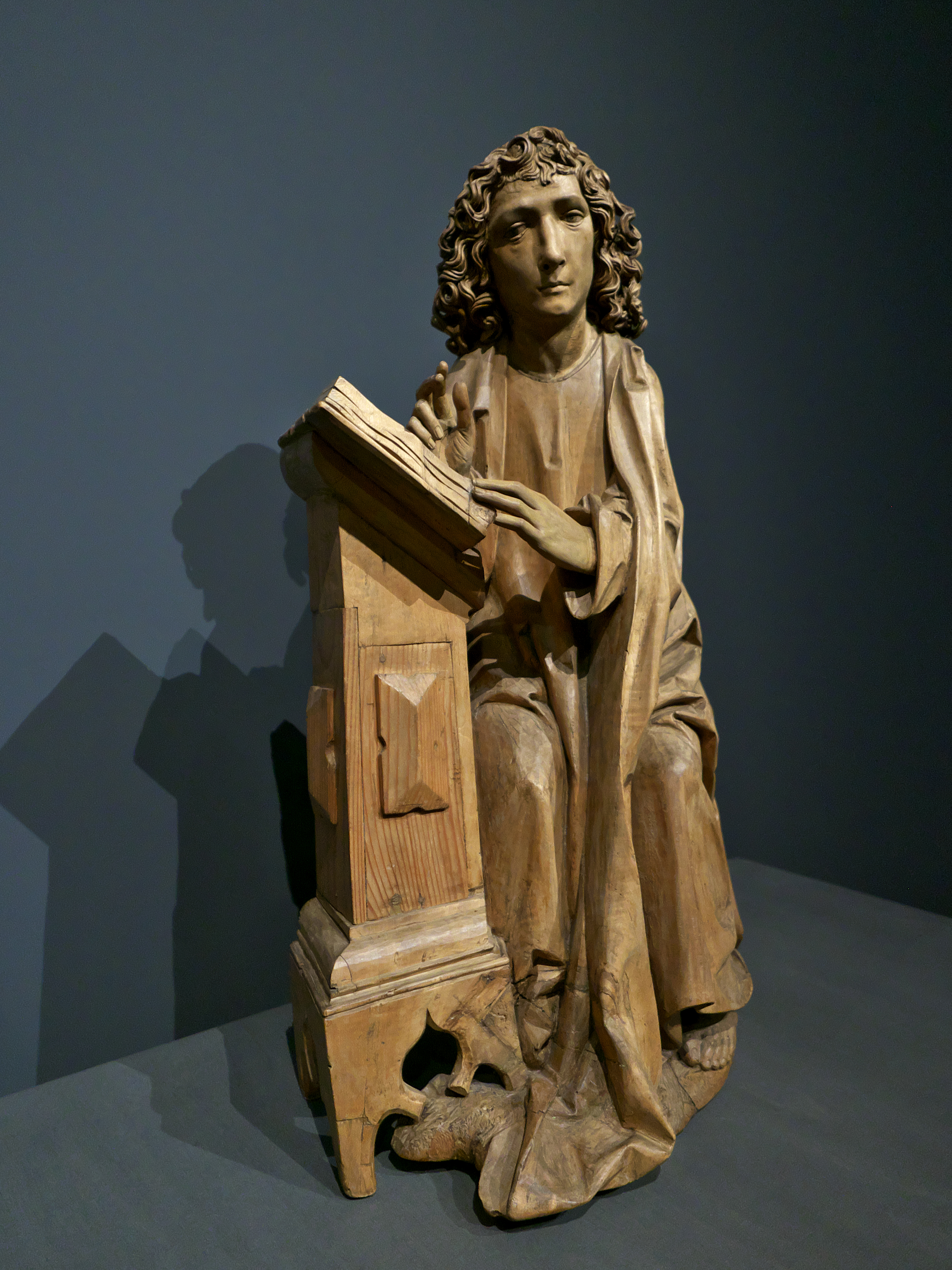 Últimos fuegos góticos, Palacio de Villena (Valladolid). Tilman Riemschneider (1490-1492), procedente del Bode Museum. Banco del retablo mayor de la Iglesia de Santa María Magdalena (Münnerstadt)